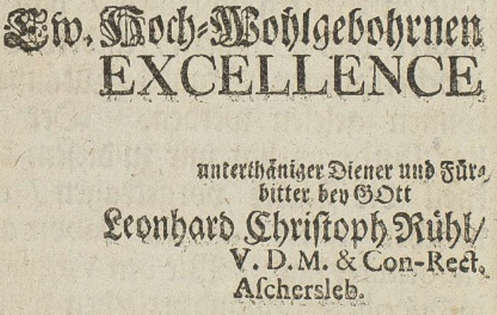 Leonhard Christoph Rühl. Schluss der Zuschrifft (Widmung) seiner Schrift M. T. Ciceronis Epistolæ Ad Familiares an den Regierungspräsidenten in Halberstadt Friedrich von Hamrath (1) - V.D.M. steht für Verbi Divini Minister.